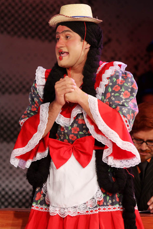 El candidato estuvo el pasado viernes 13 de noviembre en el emblemático programa.